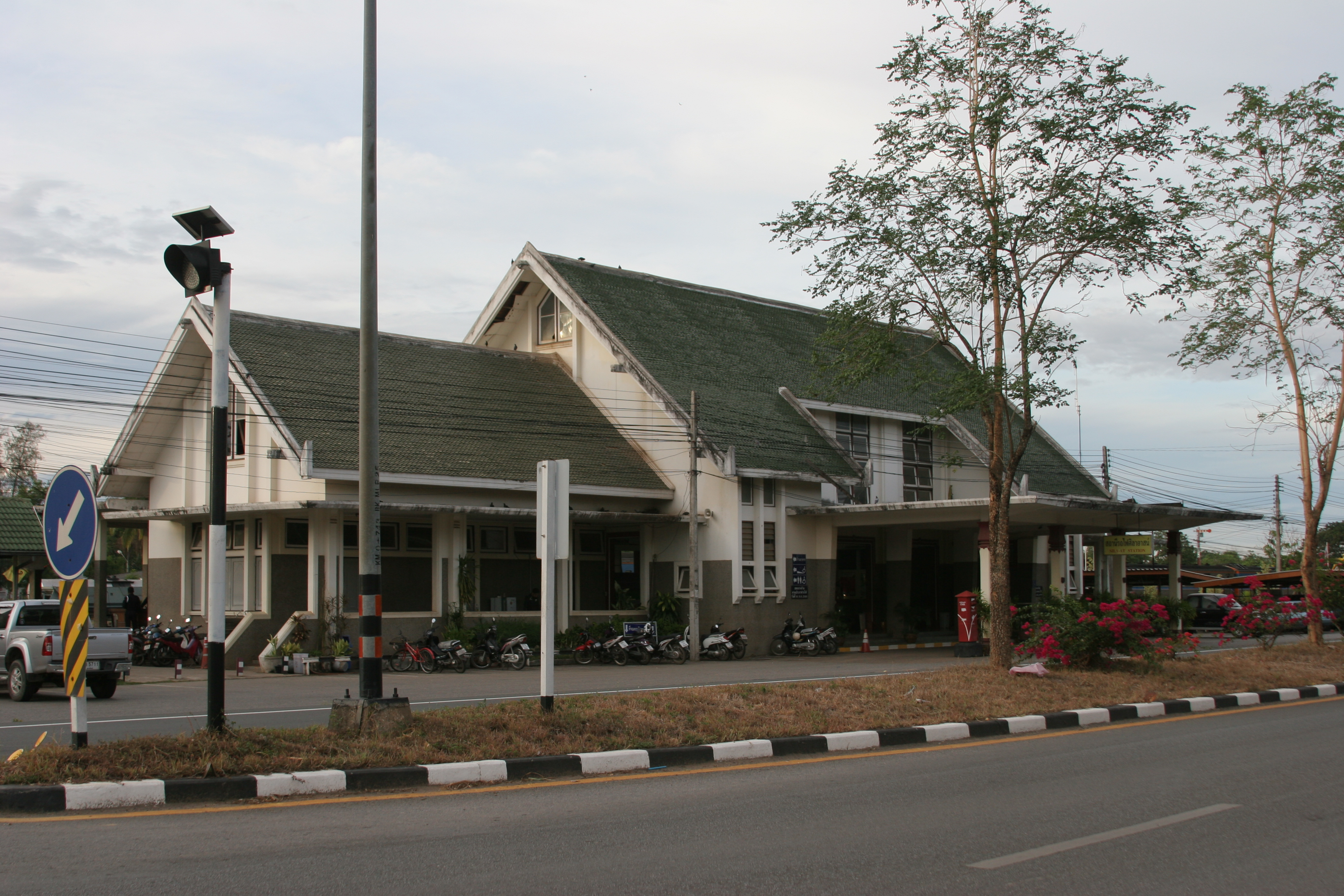 シラアット駅